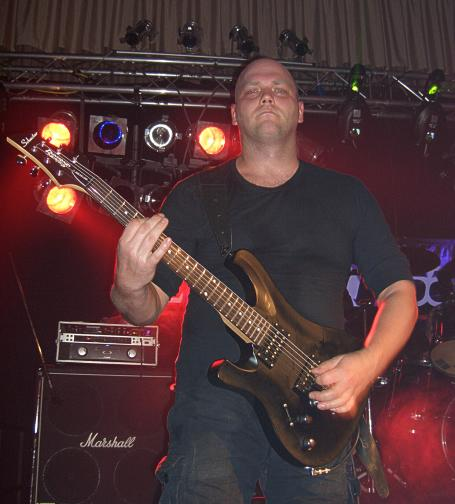 Mario, Gitarrist von My Insanity